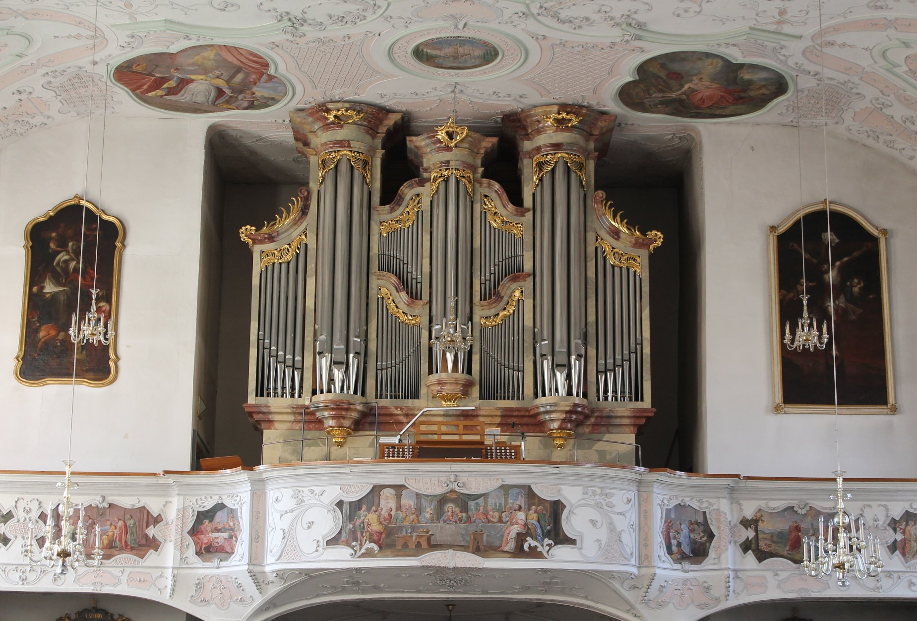 Orgel der Heilig-Geist-Spitalkirche in Neuburg an der Donau (1997, Link, III/47)